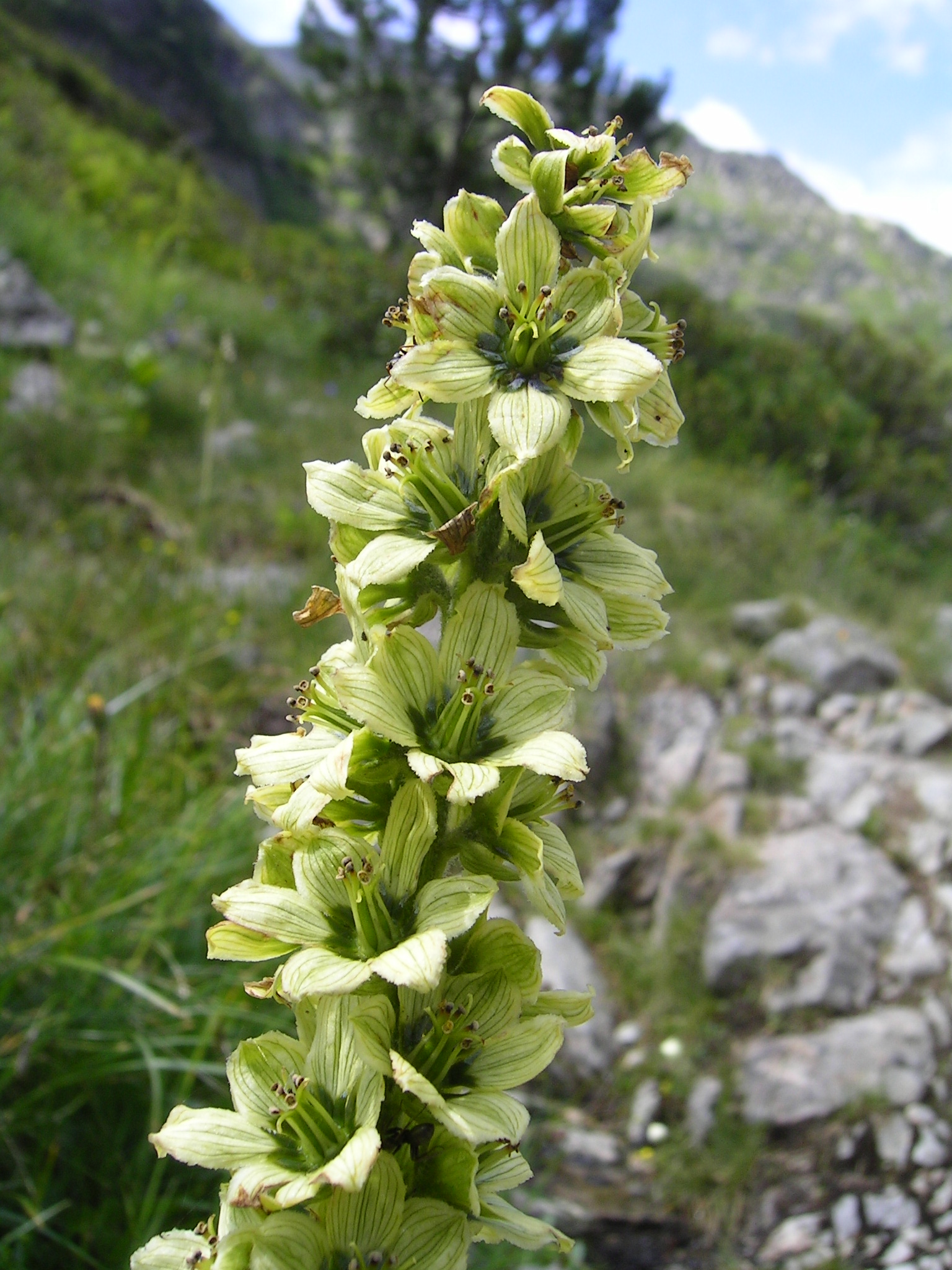 (en) Veratrum album (de) Weisser Germer (Veratrum album) Place/Ort: Meiringen, Berner Oberland, CH. Susten, alter Säumerweg. Leicht torfige Wiese.